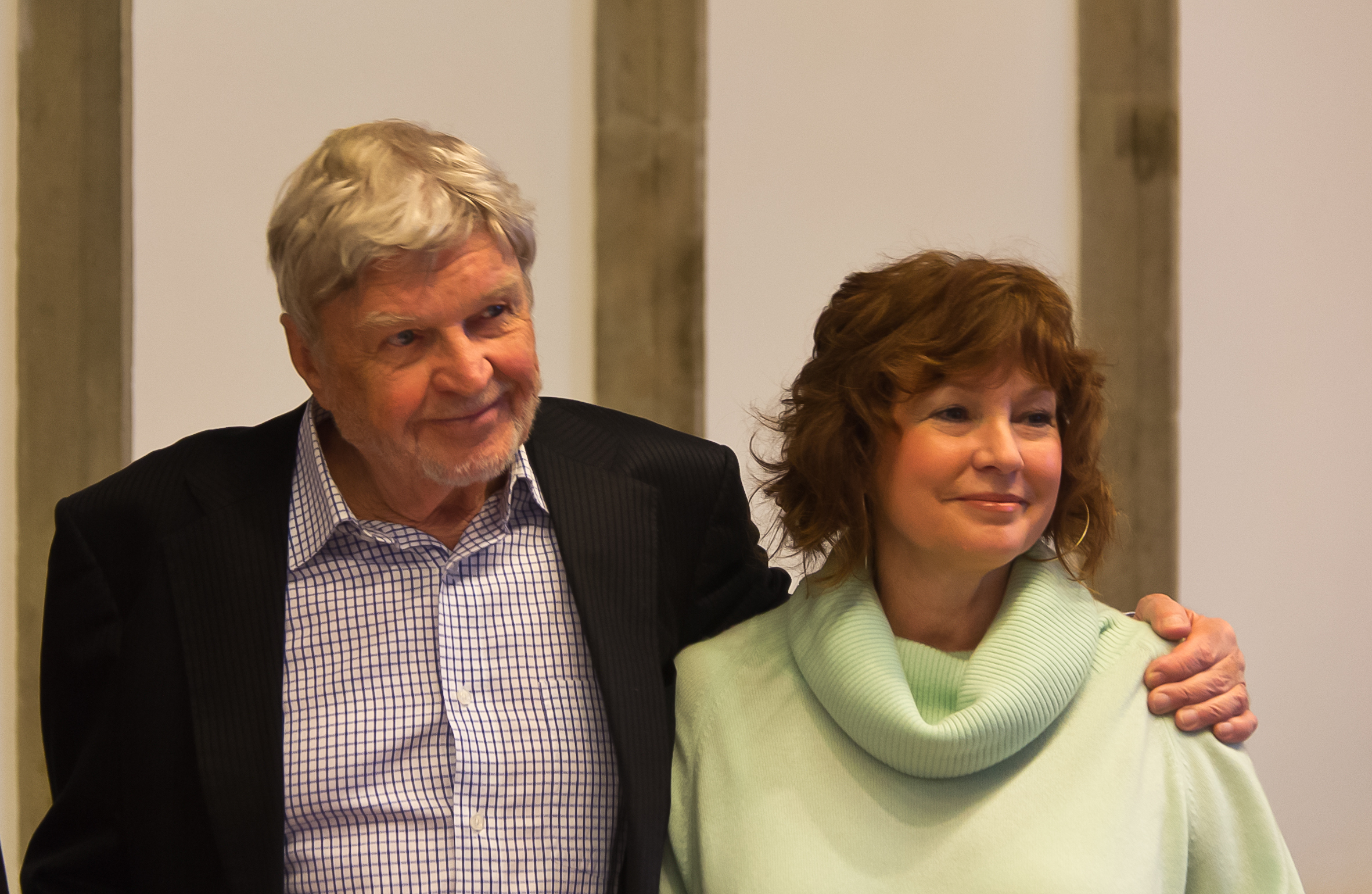 Pressekonferenz Hardy Krüger "Gemeinsam gegen rechte Gewalt" im Historischen Rathaus von Köln Foto: Hardy Krüger mit Frau Anita Krüger